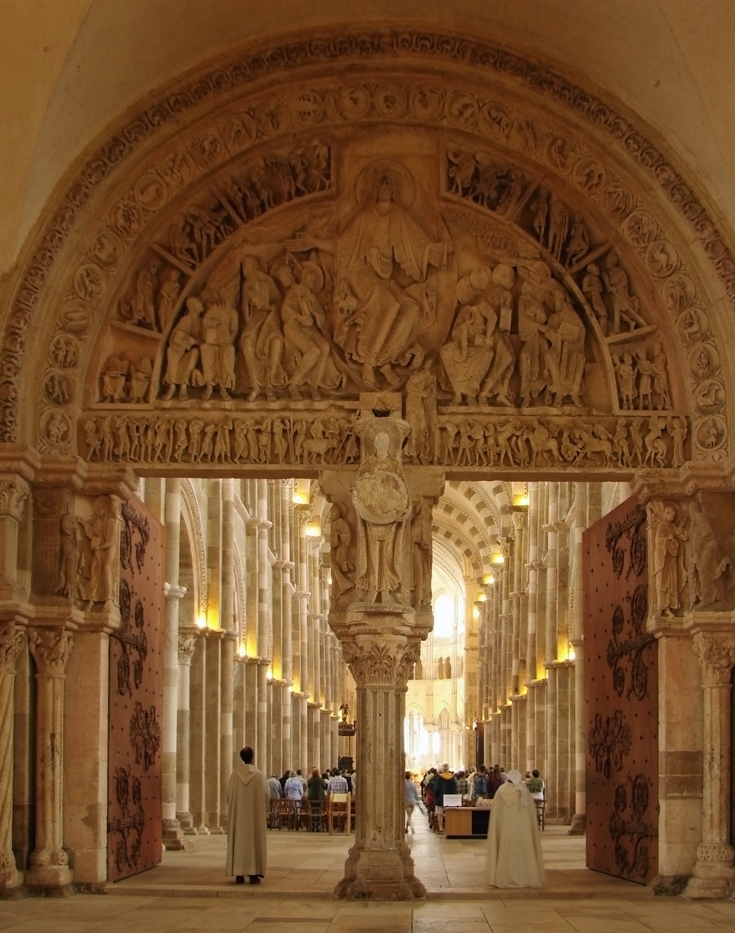 Le tympan central du narthex (1140-1150), ouvert pour la sortie de la messe. Basilique Sainte-Marie-Madeleine de Vézelay.